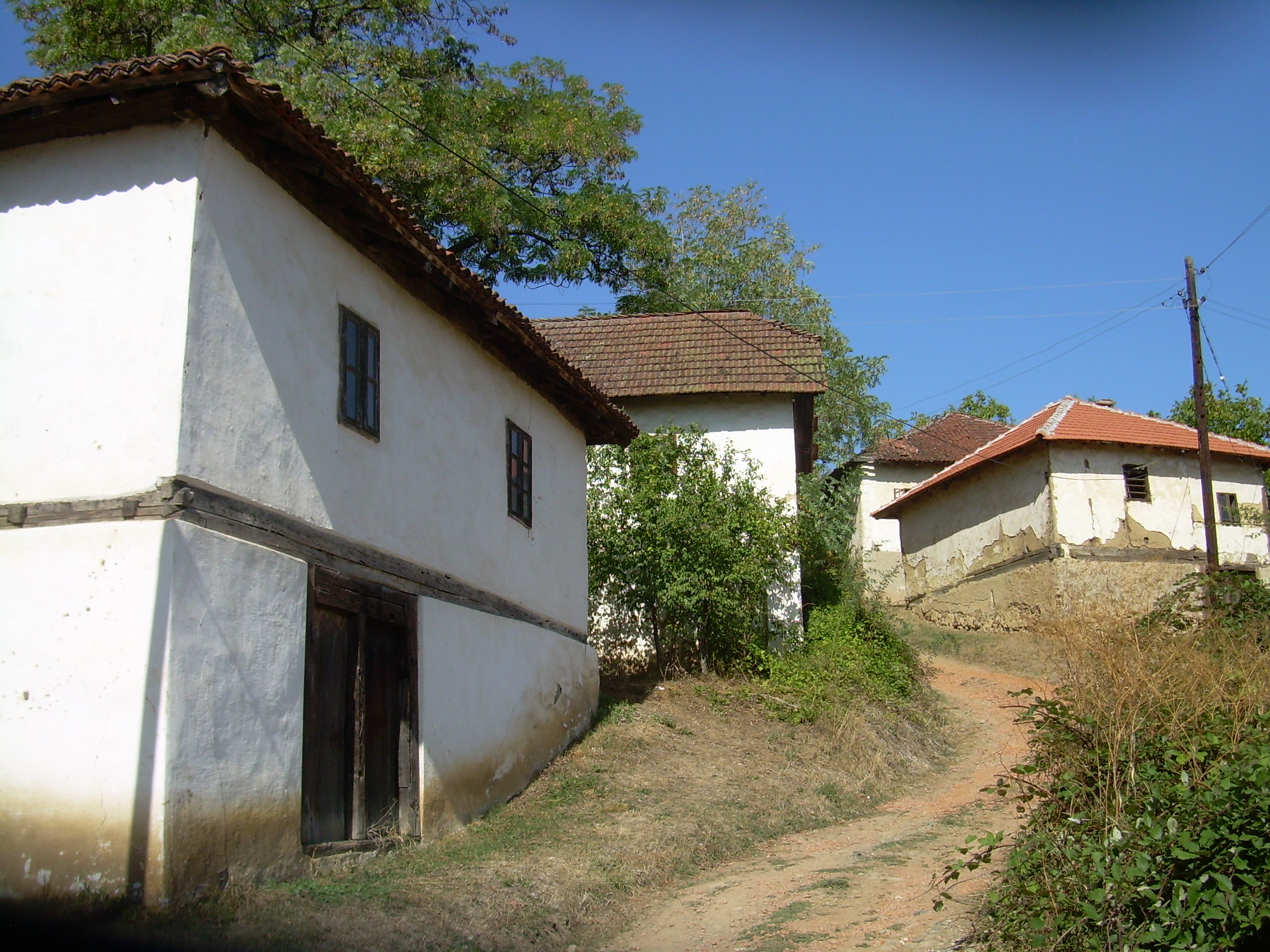 Пољане у Жупи Александровачкој су јединствена сезонска виноградарска насеља. Има их 24 али је већина у лошем стању.